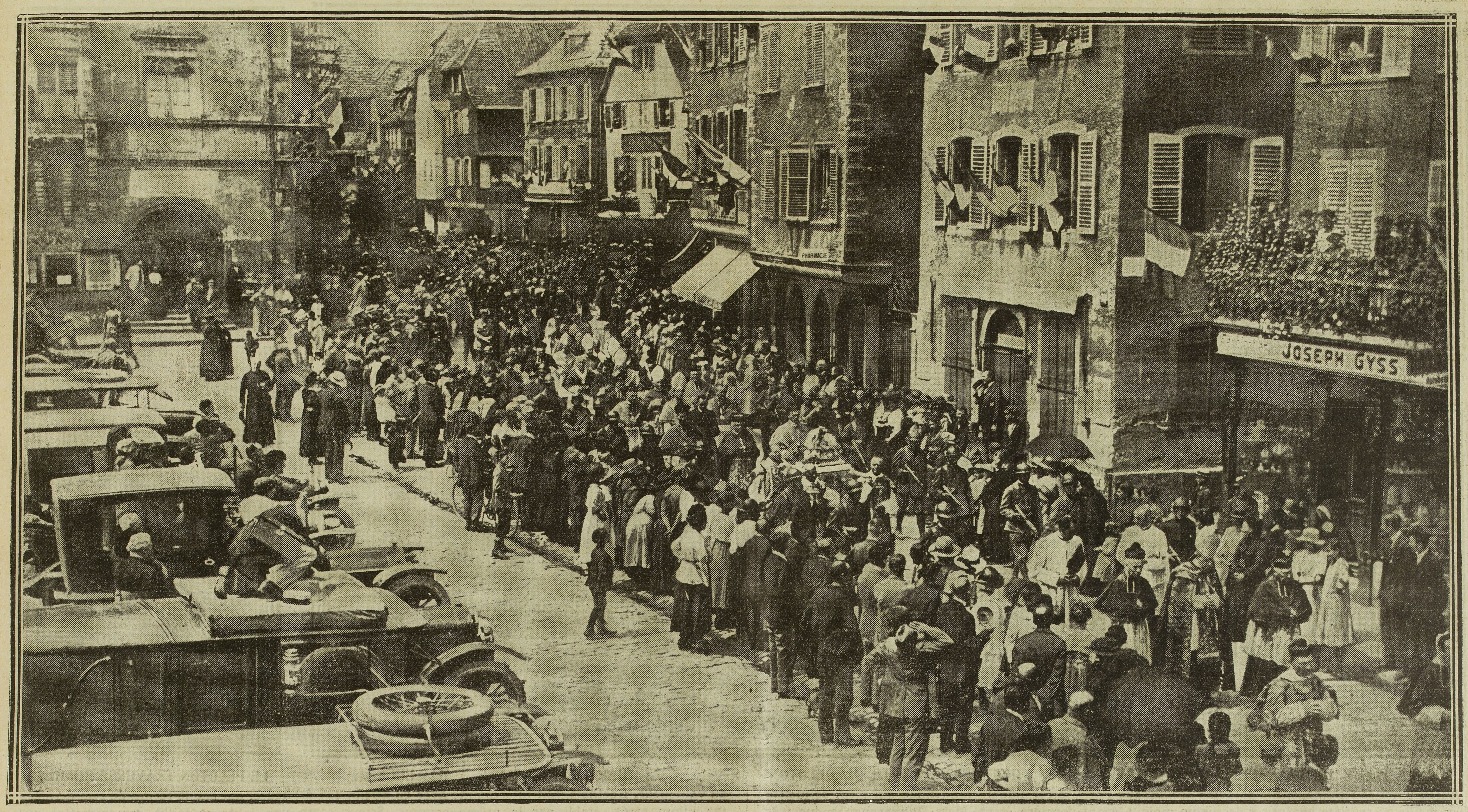 Transfert du coeur de Mgr Freppel à Obernai en Alsace. Le cortège se rend à l'église d'Obernai. — Derrière l'urne, le cardinal Luçon, archevêque de Reims, suivi de huit prélats.